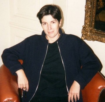 Christine Angot, écrivaine française.